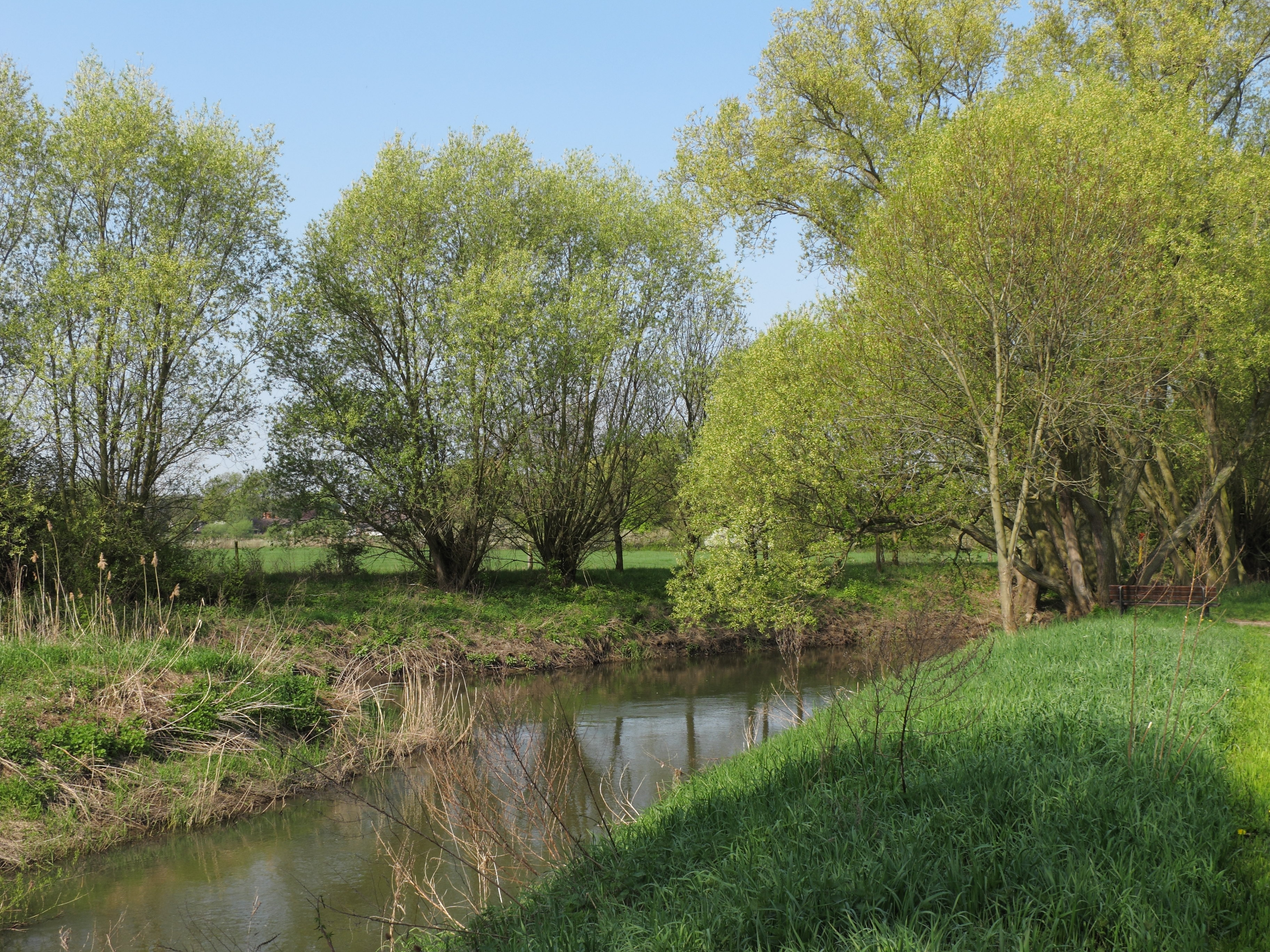 Nördliche Okeraue bei Groß Schwülper. Mündung der Schunter (im Vordergrund) in die Oker (im Hintergrund). Bereich im Naturschutzgebiet „Nördliche Okeraue (zwischen Hülperode und Neubrück)“ (NSG BR 099) im Landkreis Gifhorn.